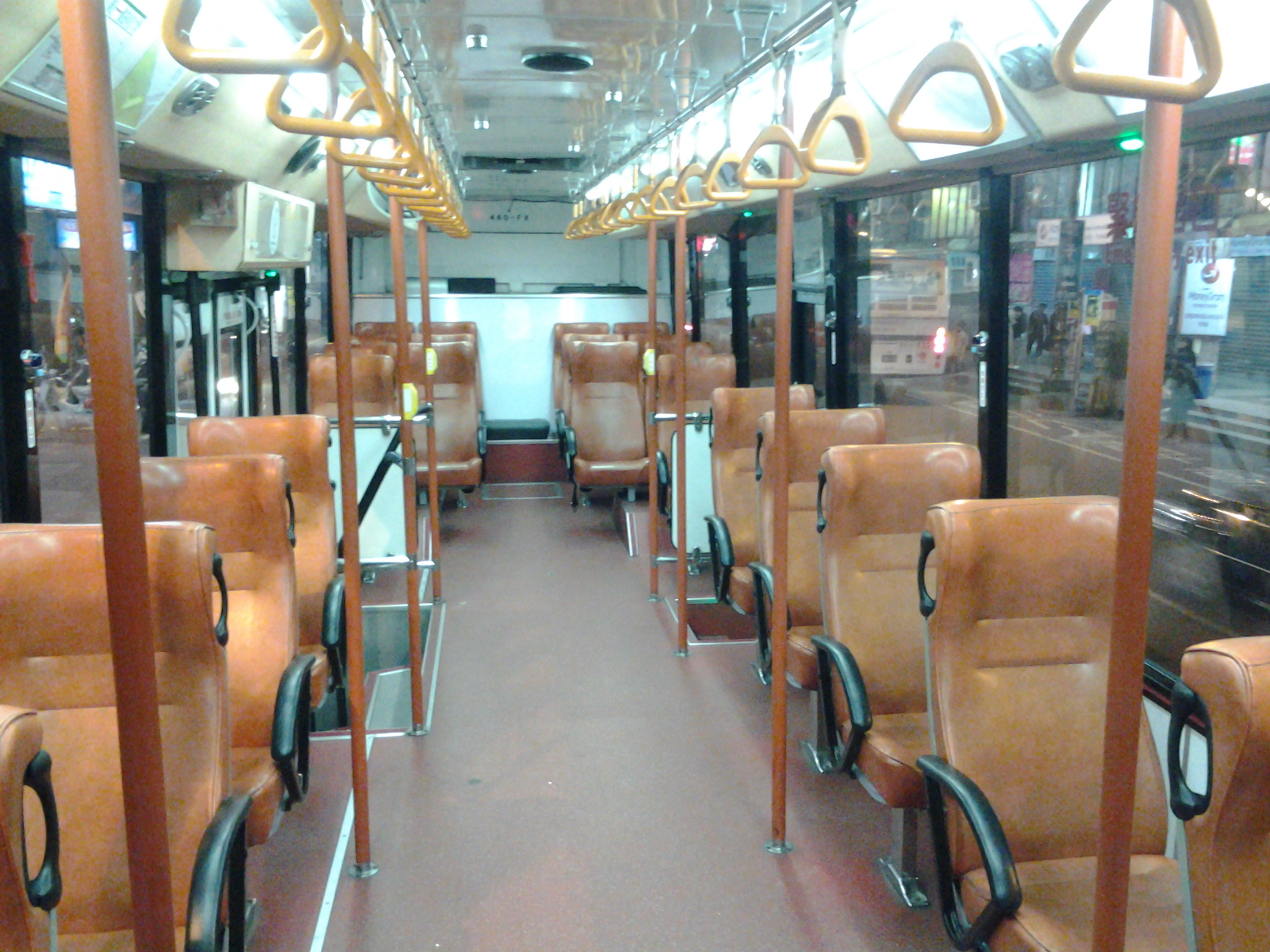 台中客運2005〈2012〉 HINO ERK2JRL（固特）